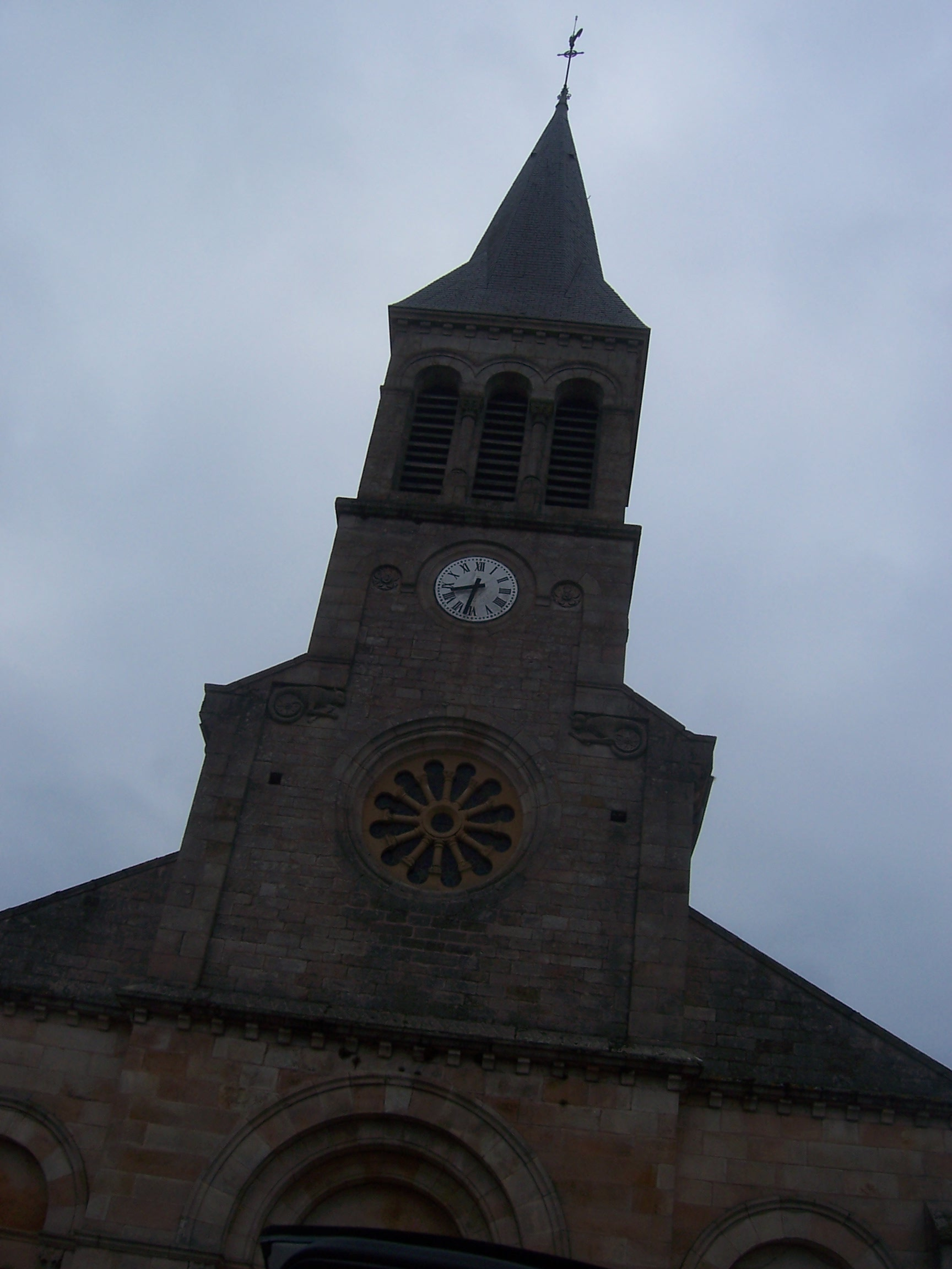 Eglise de Saint-Bonnet-de-Joux